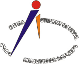 ՀՊՃՀ Ուսանողական խորհրդի տարբերանշանը